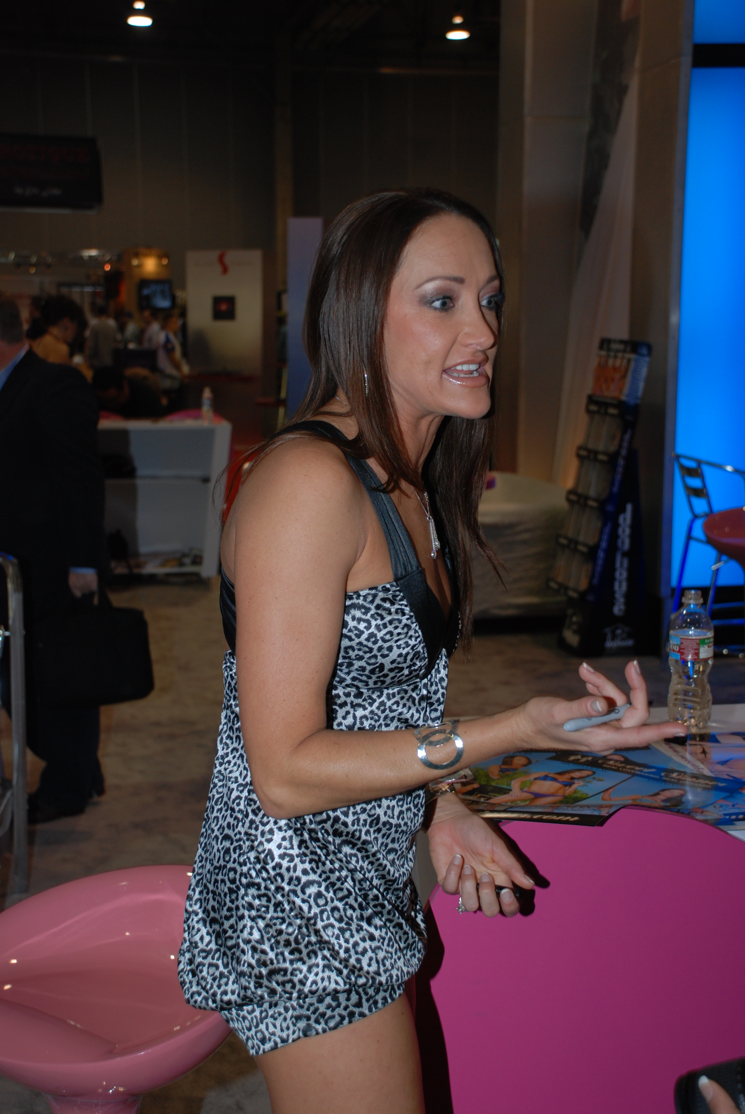 Michelle Lay